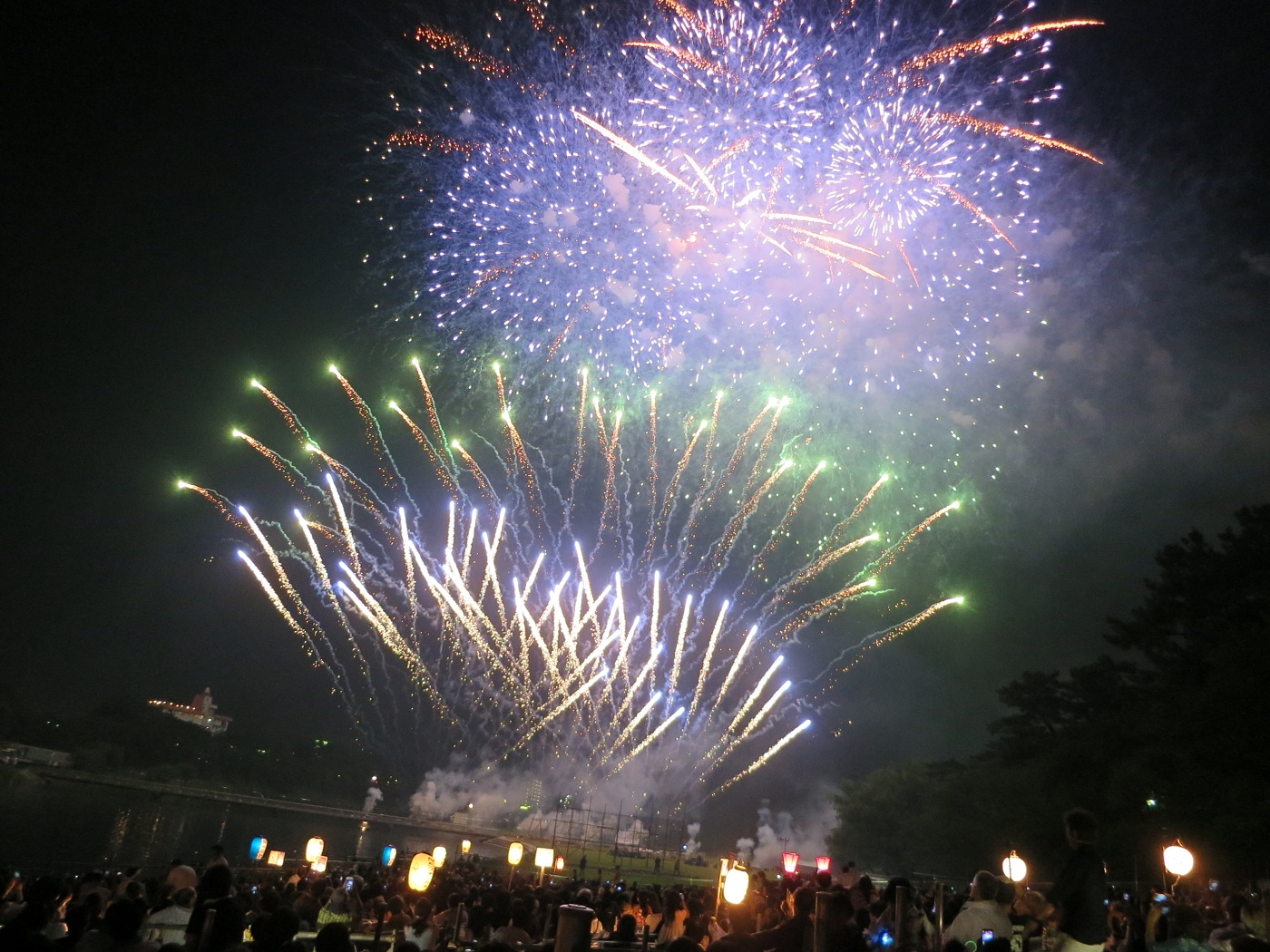 岡崎城下家康公夏まつり 第67回花火大会